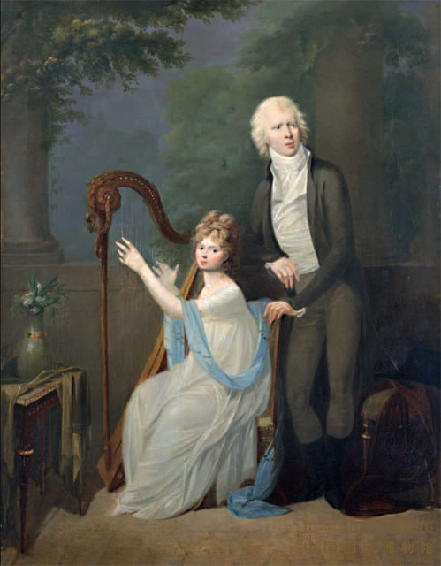 Erbherzog August von Sachsen-Gotha-Altenburg (1772-1822) und seine Frau Louise Charlotte von Mecklenburg-Schwerin (1779-1801)Augustus, Duke of Saxe-Gotha-Altenburg and his wife Louise of Mecklenburg-Schwerintitle QS:P1476,de:"Erbherzog August von Sachsen-Gotha-Altenburg (1772-1822) und seine Frau Louise Charlotte von Mecklenburg-Schwerin (1779-1801)" label QS:Lde,"Erbherzog August von Sachsen-Gotha-Altenburg (1772-1822) und seine Frau Louise Charlotte von Mecklenburg-Schwerin (1779-1801)" label QS:Len,"Augustus, Duke of Saxe-Gotha-Altenburg and his wife Louise of Mecklenburg-Schwerin" label QS:Lru,"Наследный принц Август Саксен-Гота-Альтенбургский (1772-1822) с супругой Луизой Шарлоттой Мекленбург-Шверинской (1779-1801)."